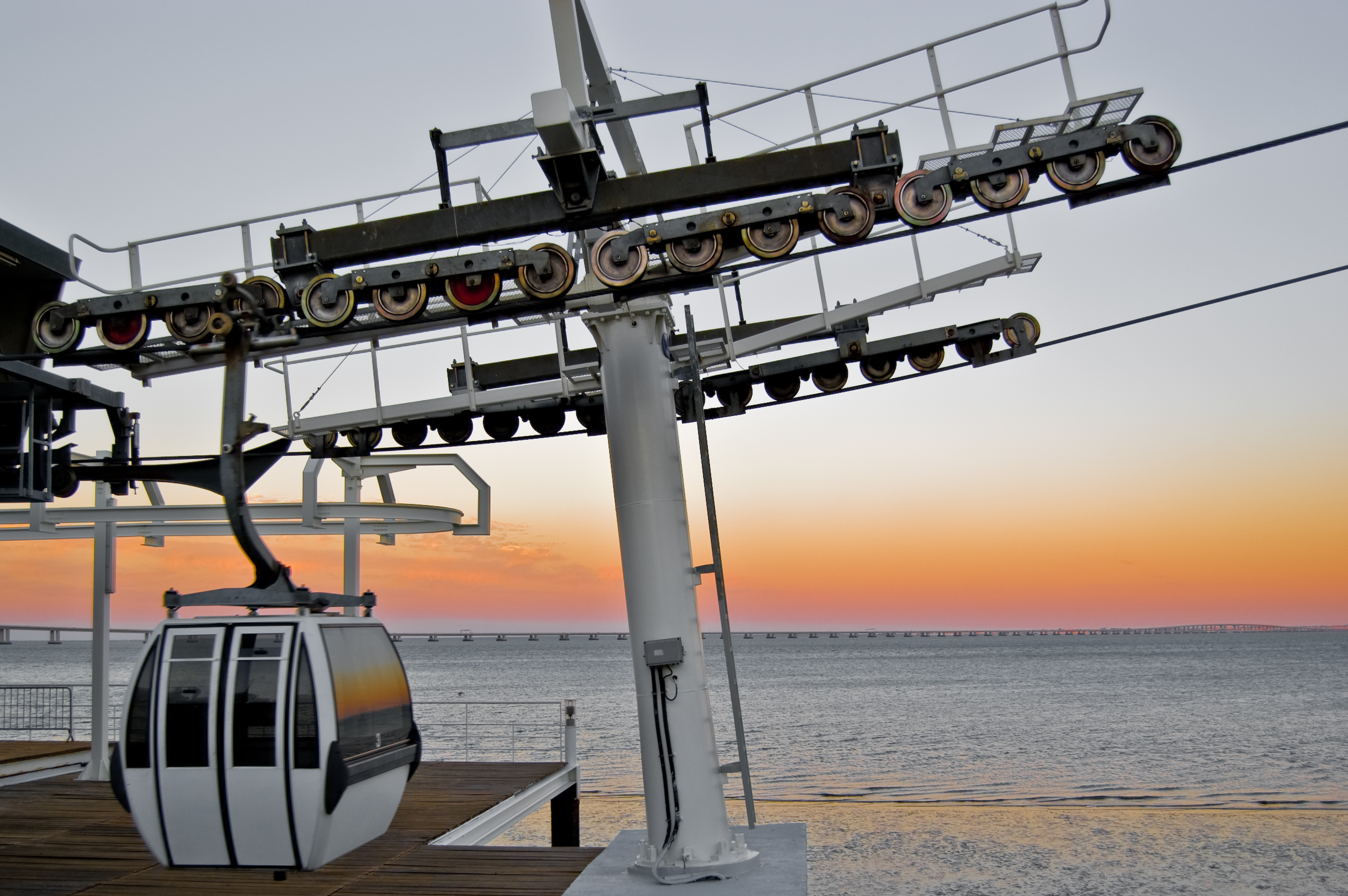 In "Parque das Nações", where was EXPO98, in Portugal.